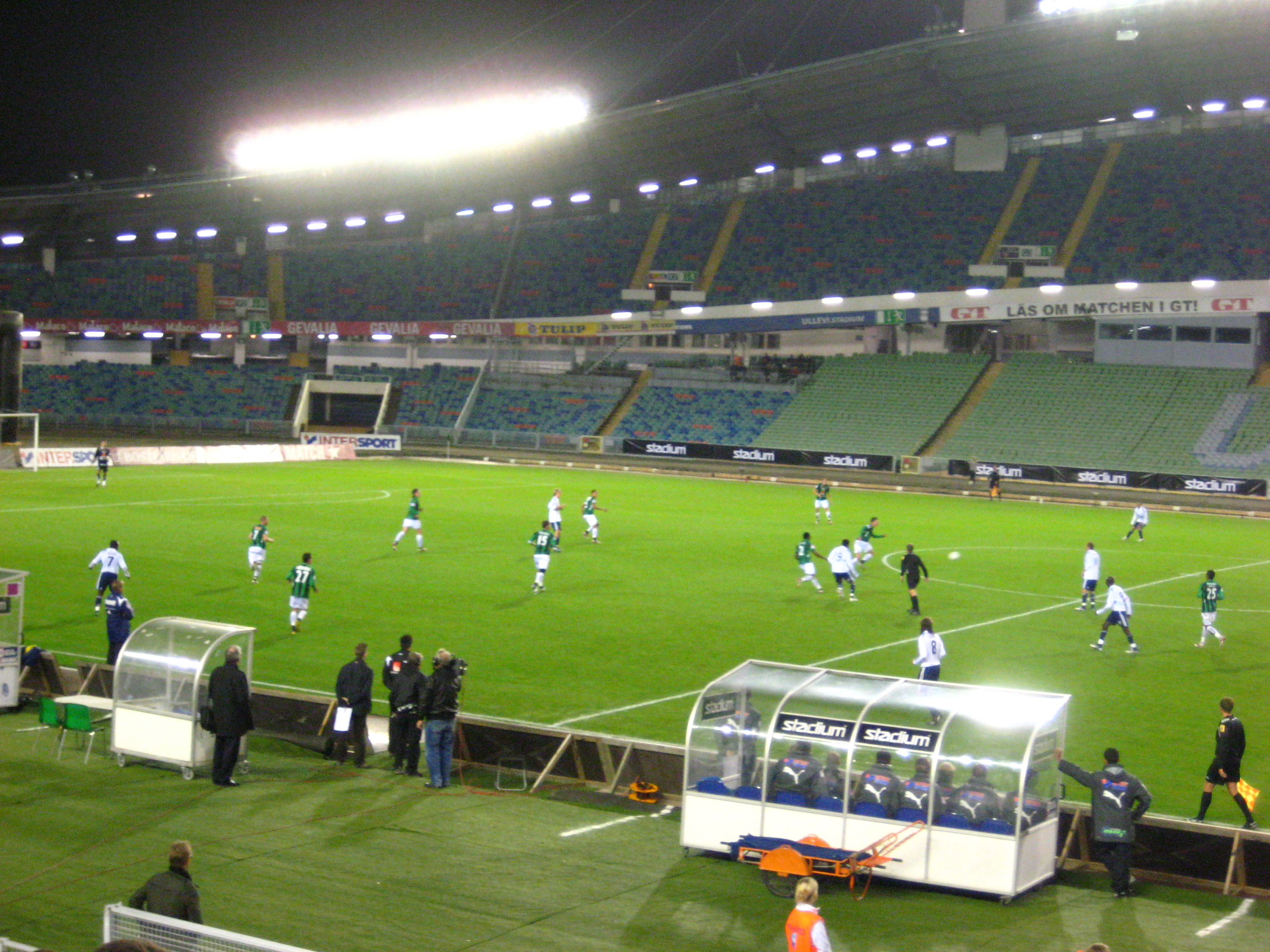 Ullevi Stadium. Photo taken during the Fotbollsallsvenskan match GAIS-Djurgårdens IF (2-1).